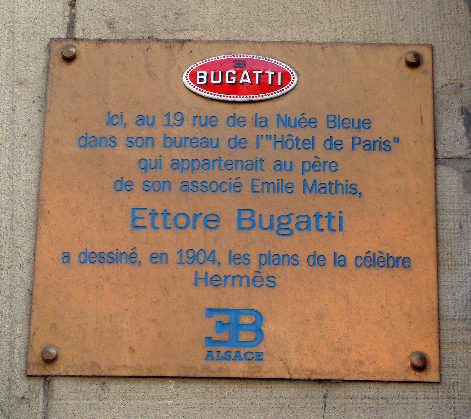 Ettore Bugatti & Emile Mathis, plaque 19 rue de la Nuée Bleue, Strasbourg, département du Bas-Rhin, France. (Bugatti Hermès ou Bugatti Type 6).